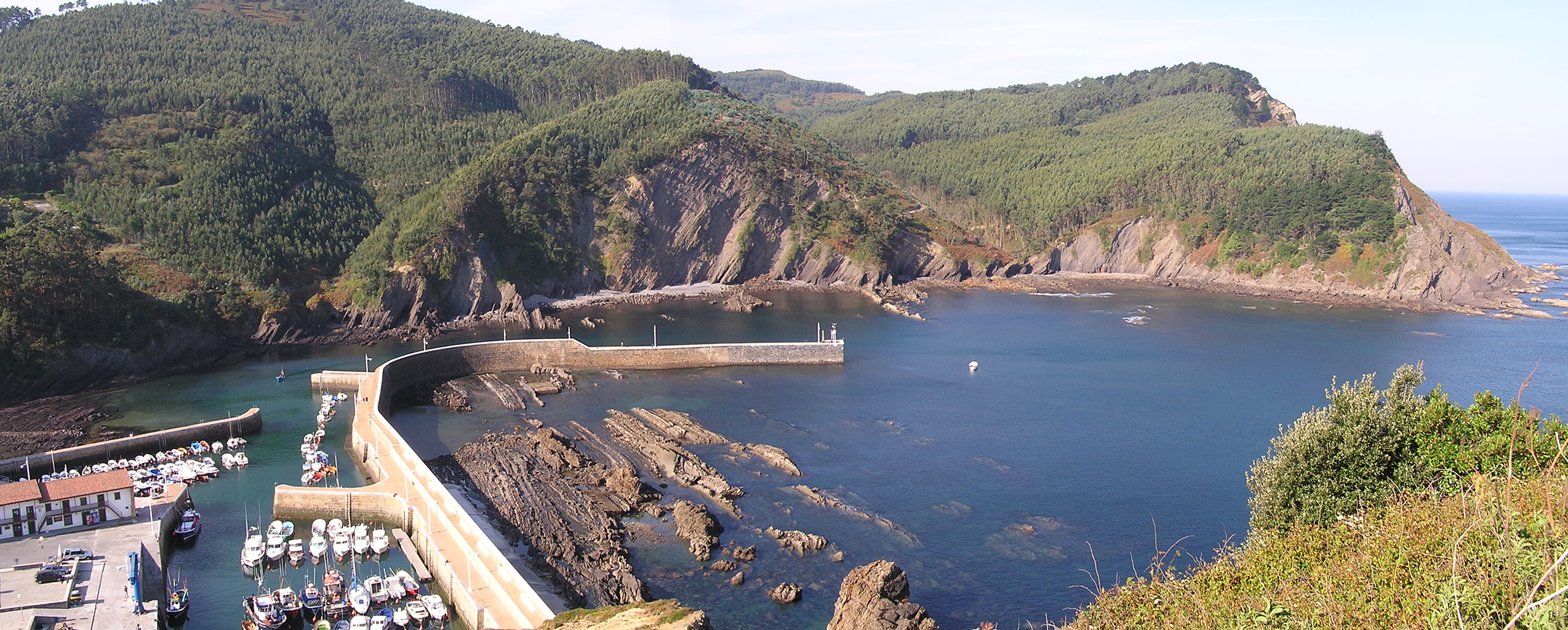 Vista de la ensenada de Armintza (Bizkaia) Autor: Juan Unda Gaubeka